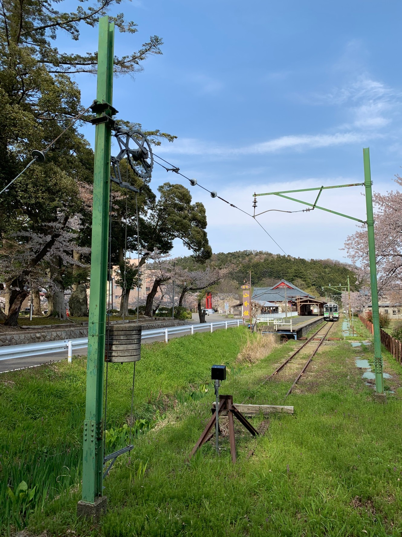 直接吊架式が特徴的な弥彦線の起点（弥彦駅，2020年4月）